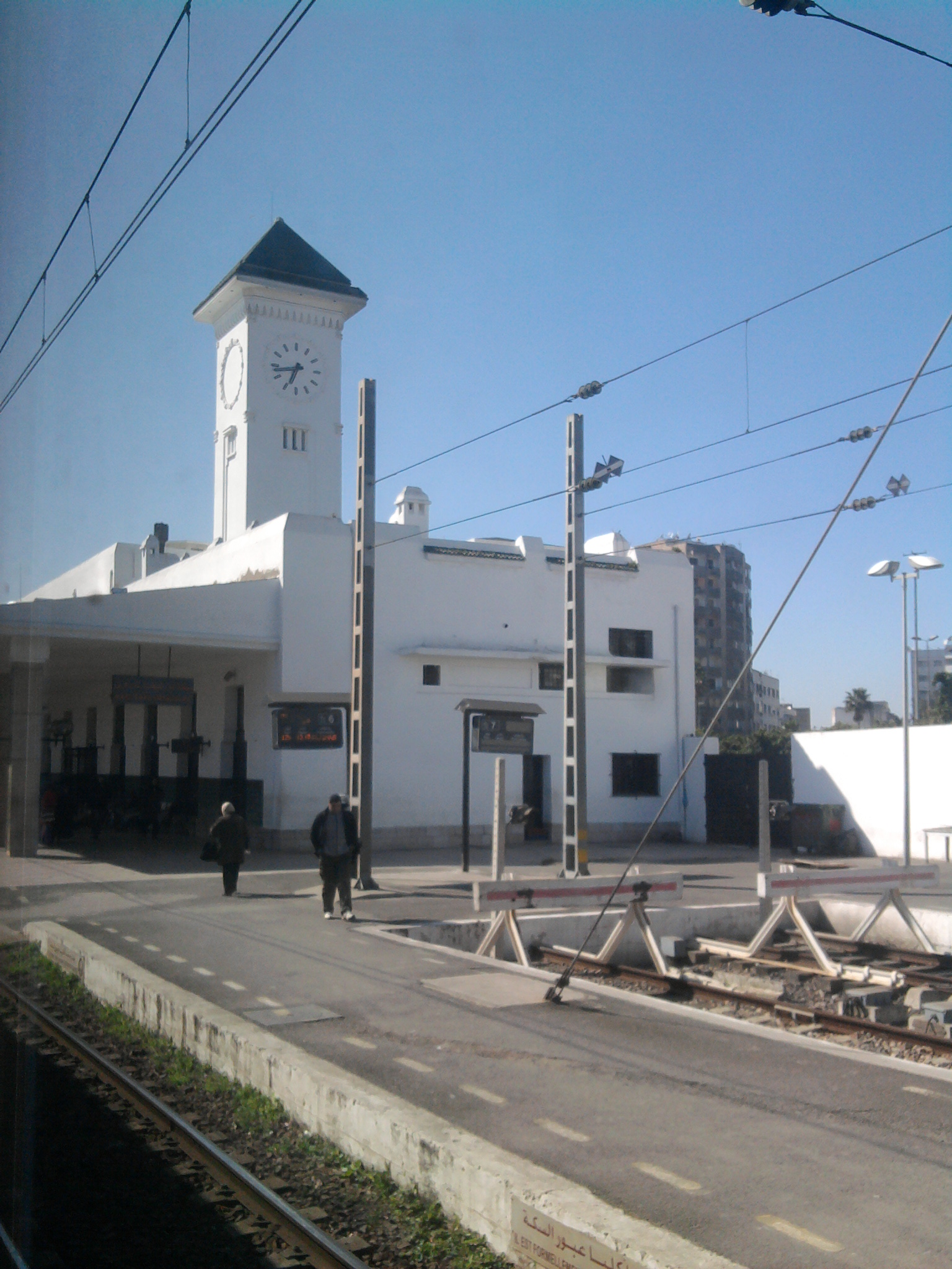 La stazione di Salè